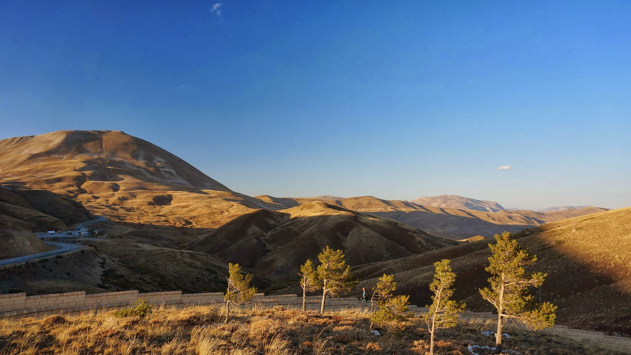 25500 Bozburun/Aşkale/Erzurum, Turkey